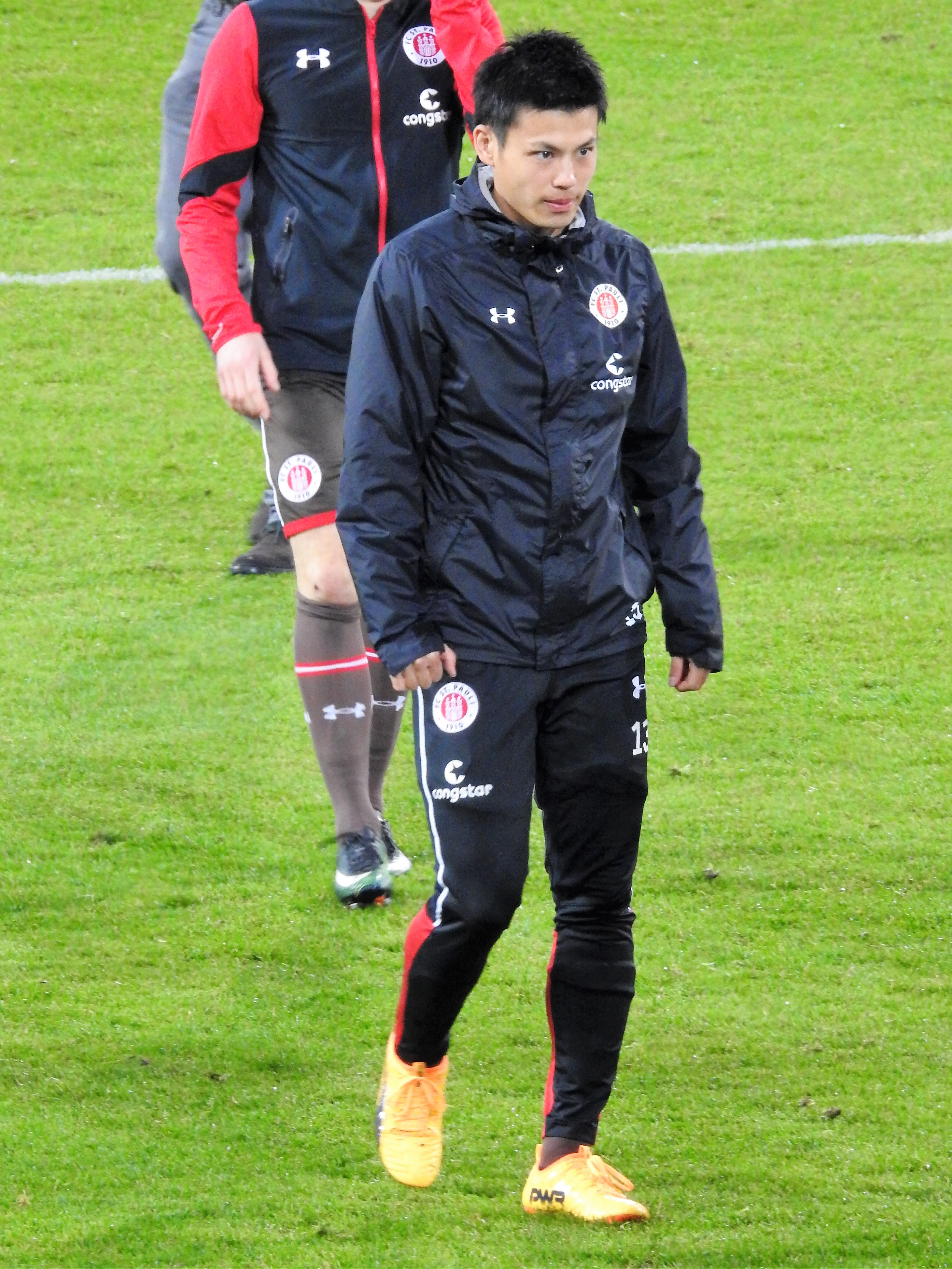 Ryo Miyaichi im Trikot des FC St.Pauli